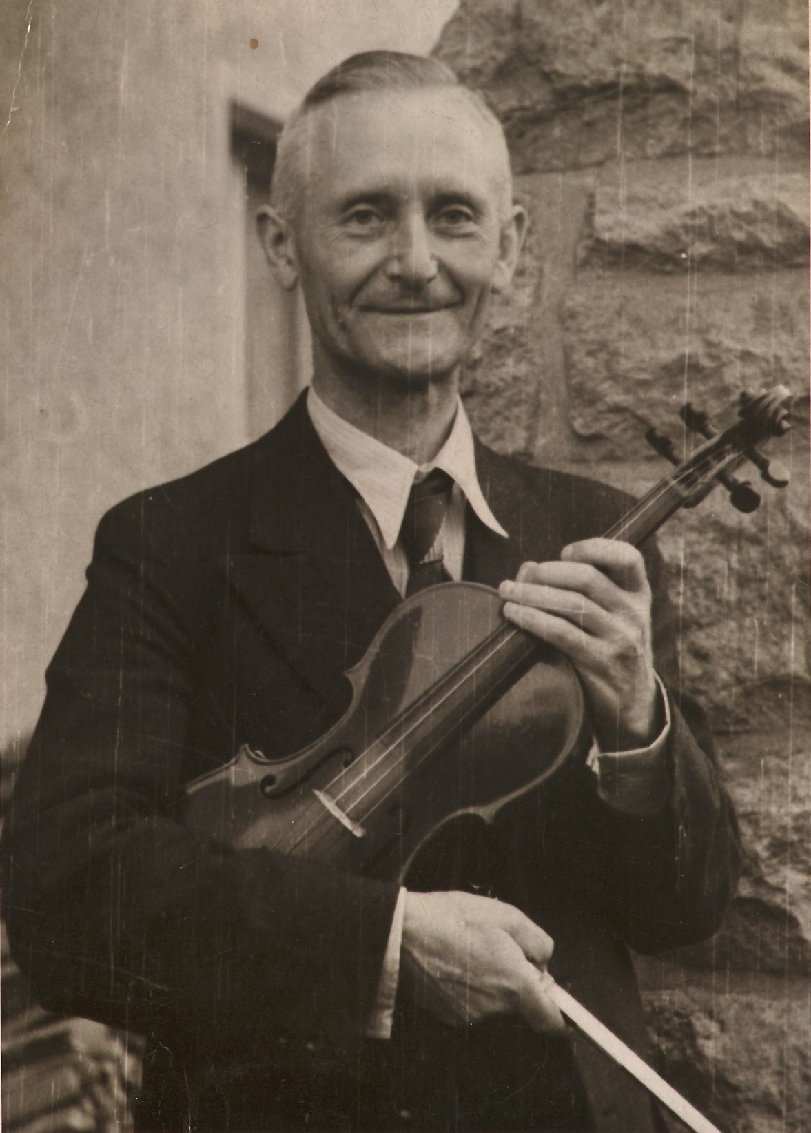 Pfarrer Paul Sauer, Bunzlau